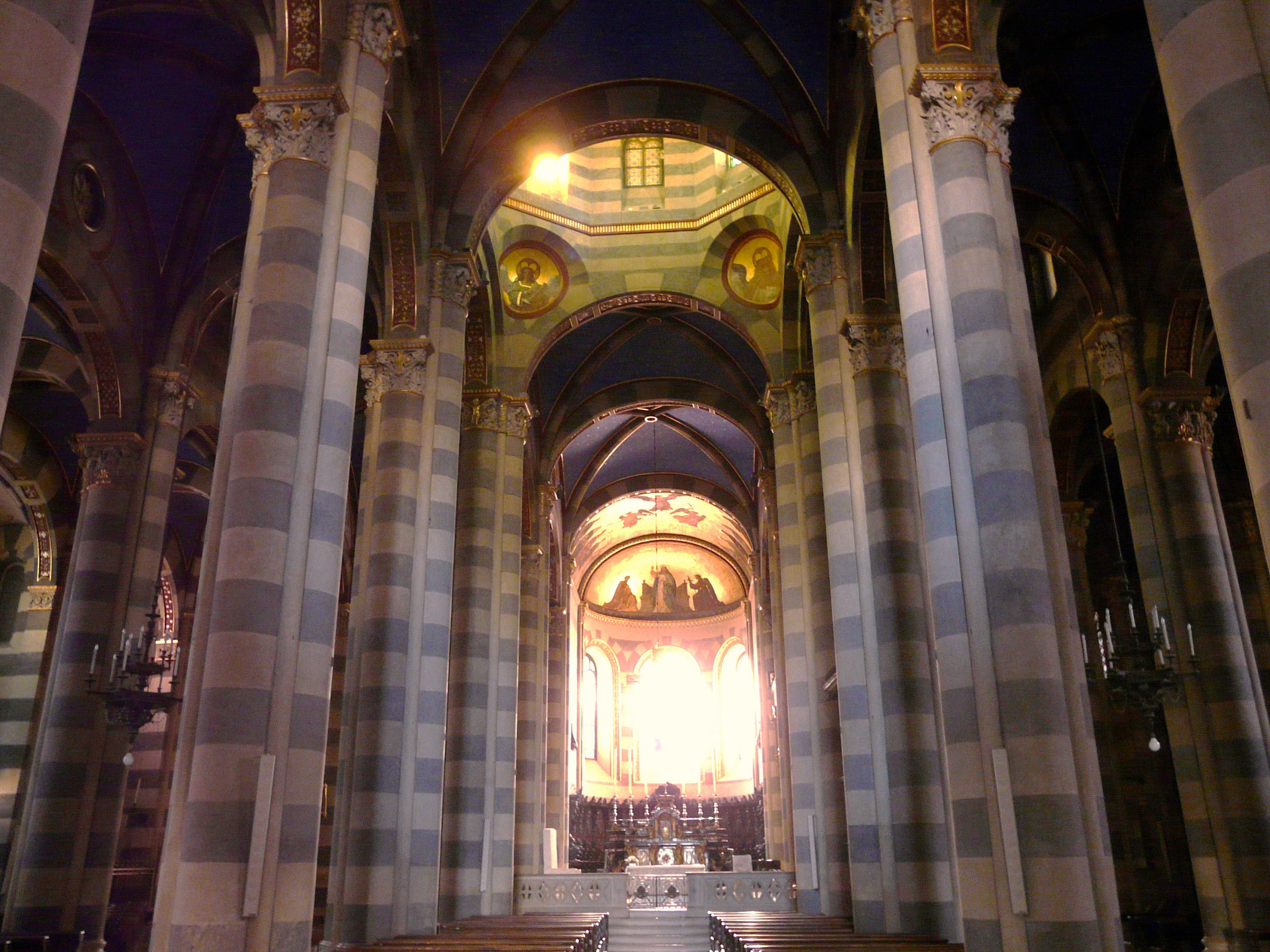 Navata centrale della cattedrale di Sant'Evasio, Casale Monferrato, Piemonte, Italia